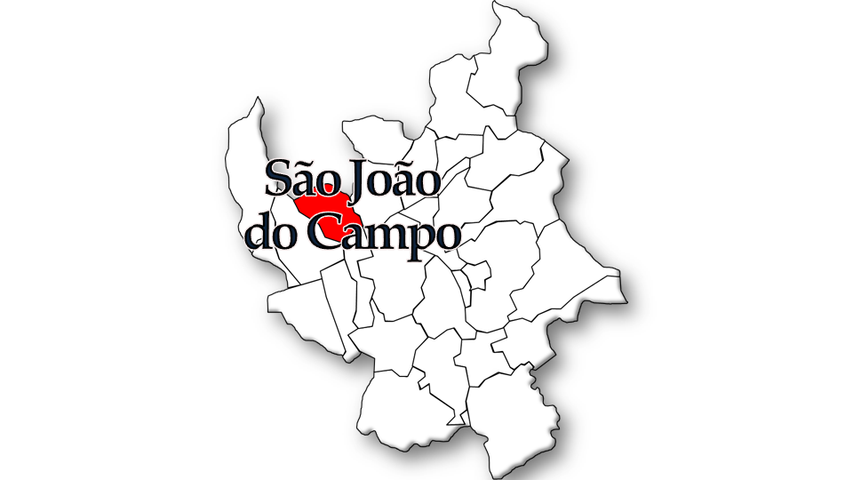 População